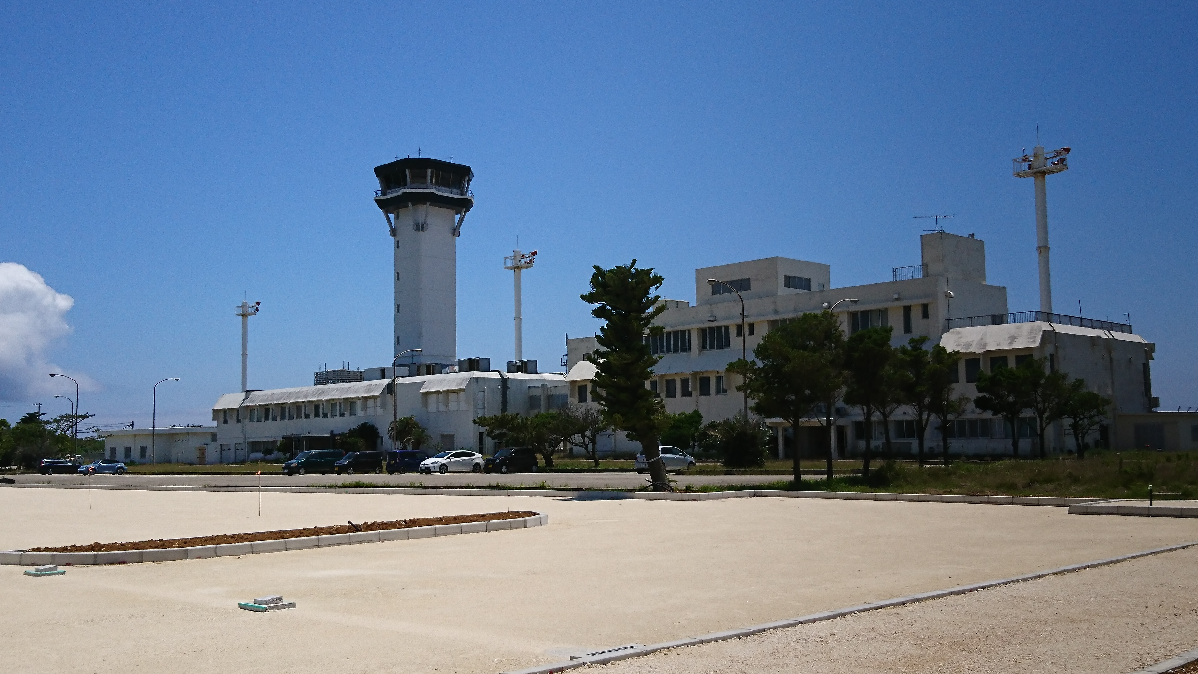 下地島空港ターミナルビル